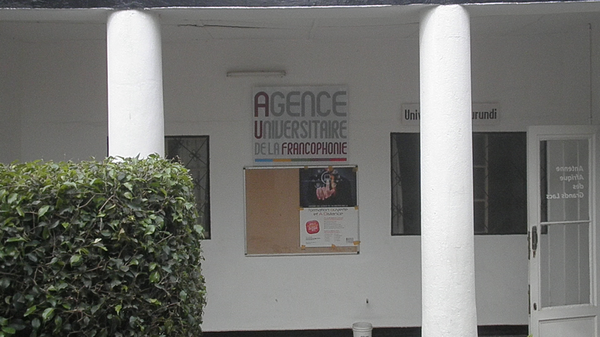 le bureau du campus numérique francophone de bujumbura